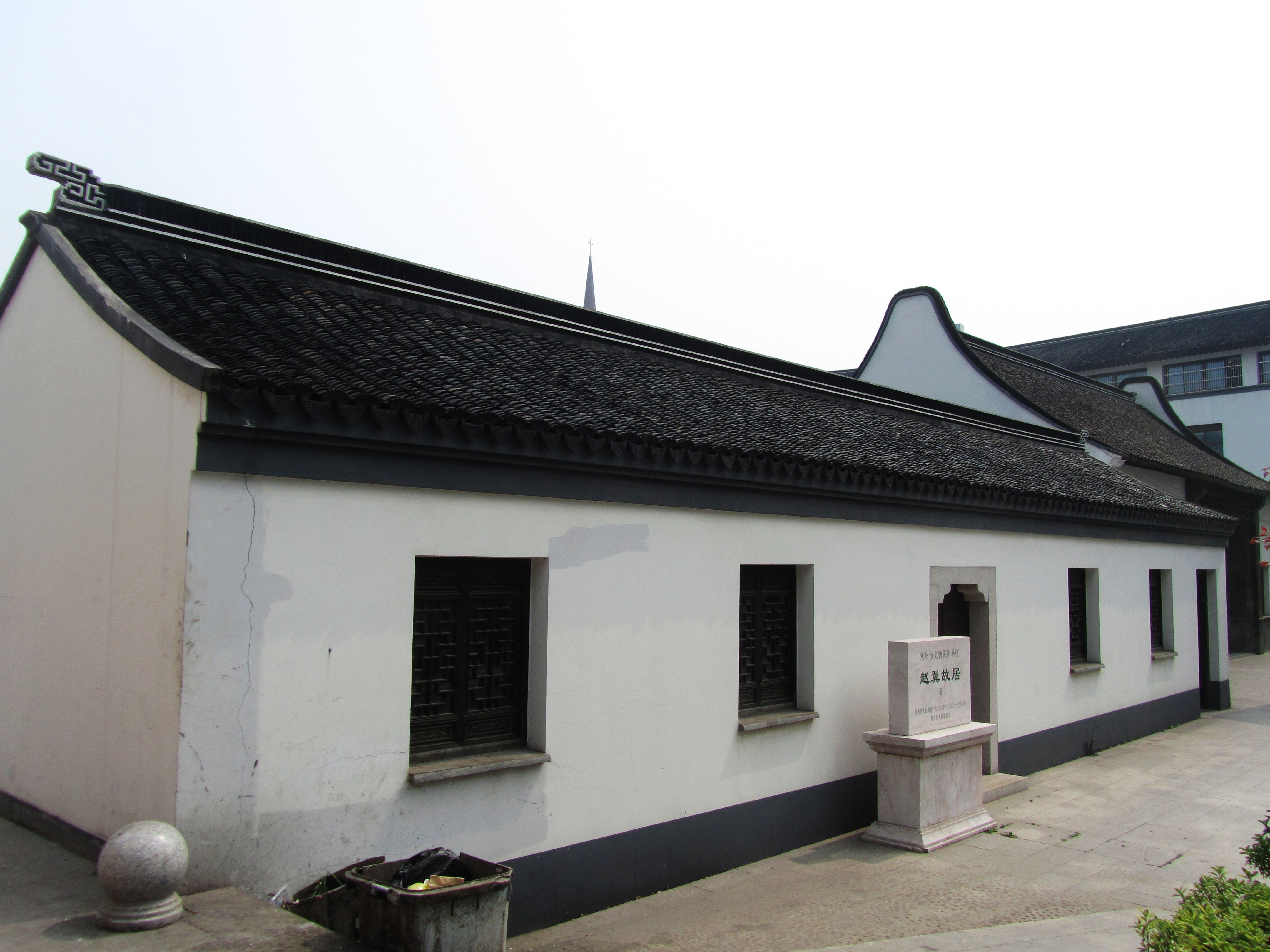 常州前北岸赵翼故居，第二进。